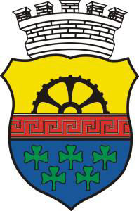 Znak města Velký Šenov